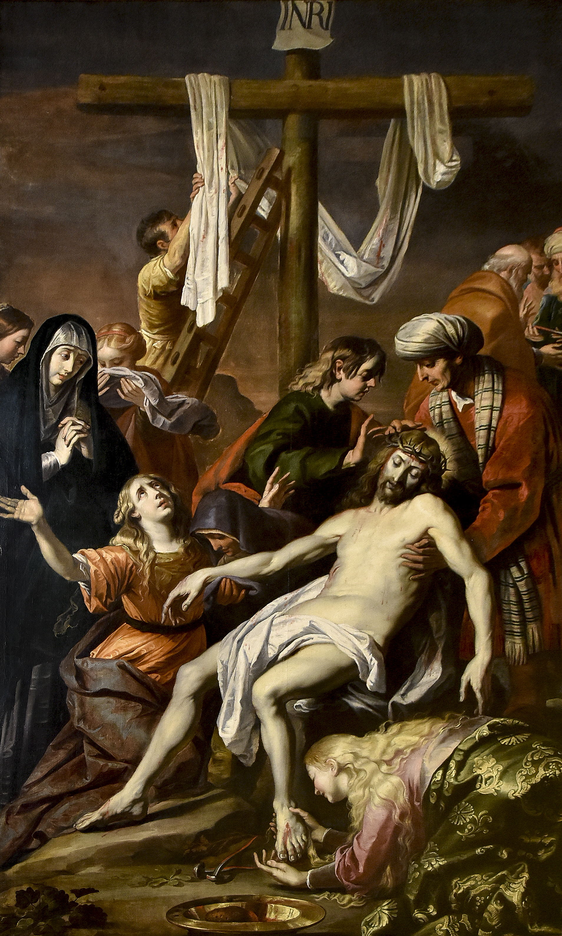 Gerard Seghers (1591-1651) De kruisafneming - Sint-Pauluskathedraal (Luik) 23-08-2018 This photo of movable heritage has been taken in the Walloon Region